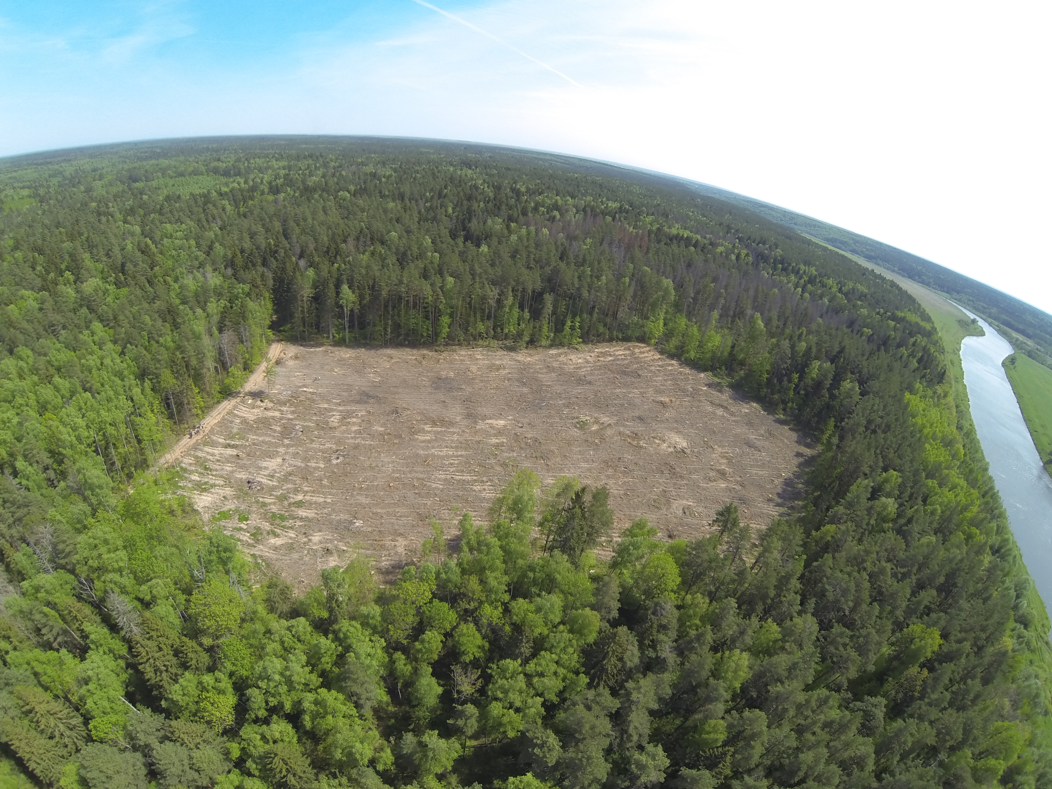 Участок леса пострадавший от короеда на территории Национального парка "Угра"